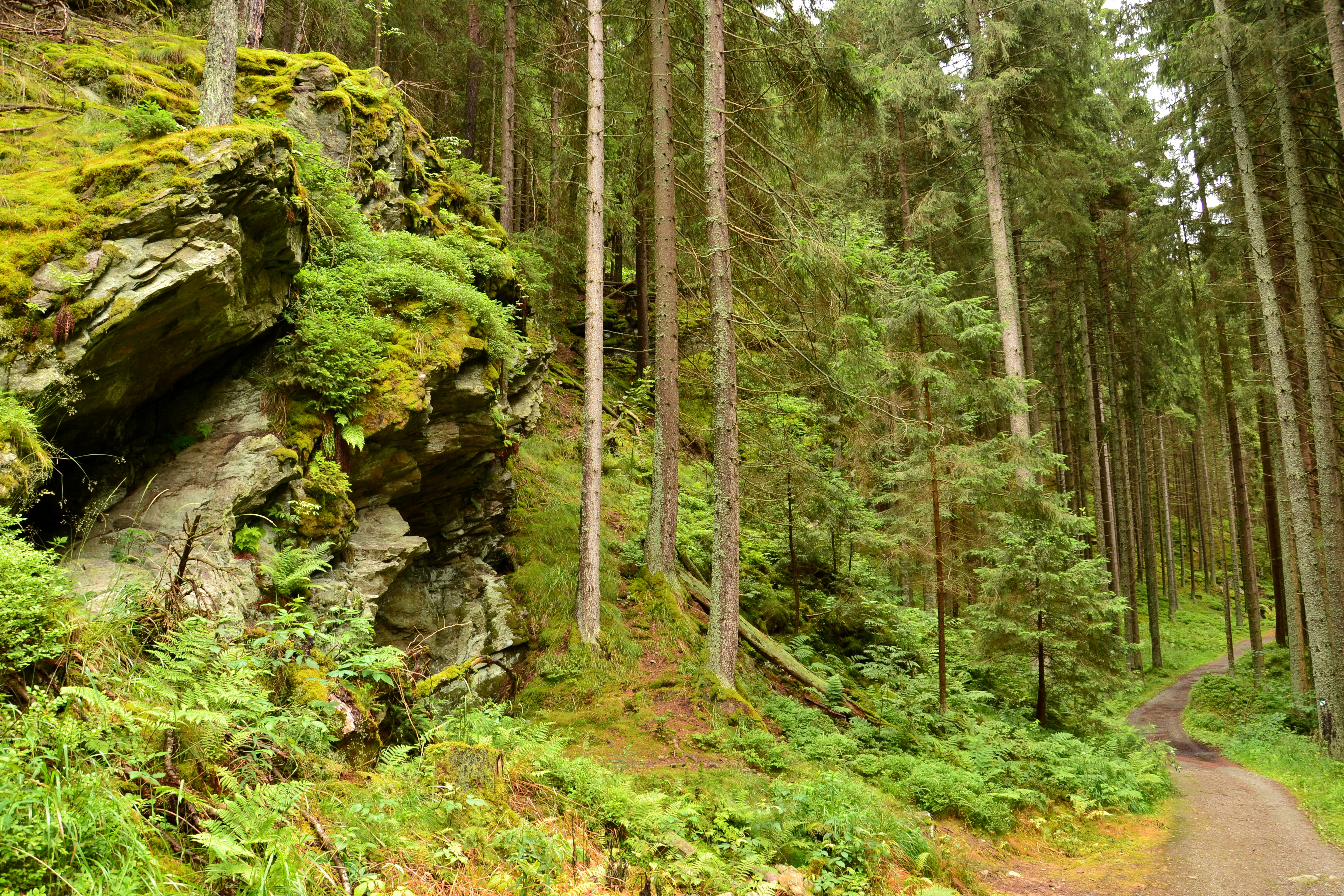 Skály nad naučnou stezkou v přírodní rezervaci Amálino údolí